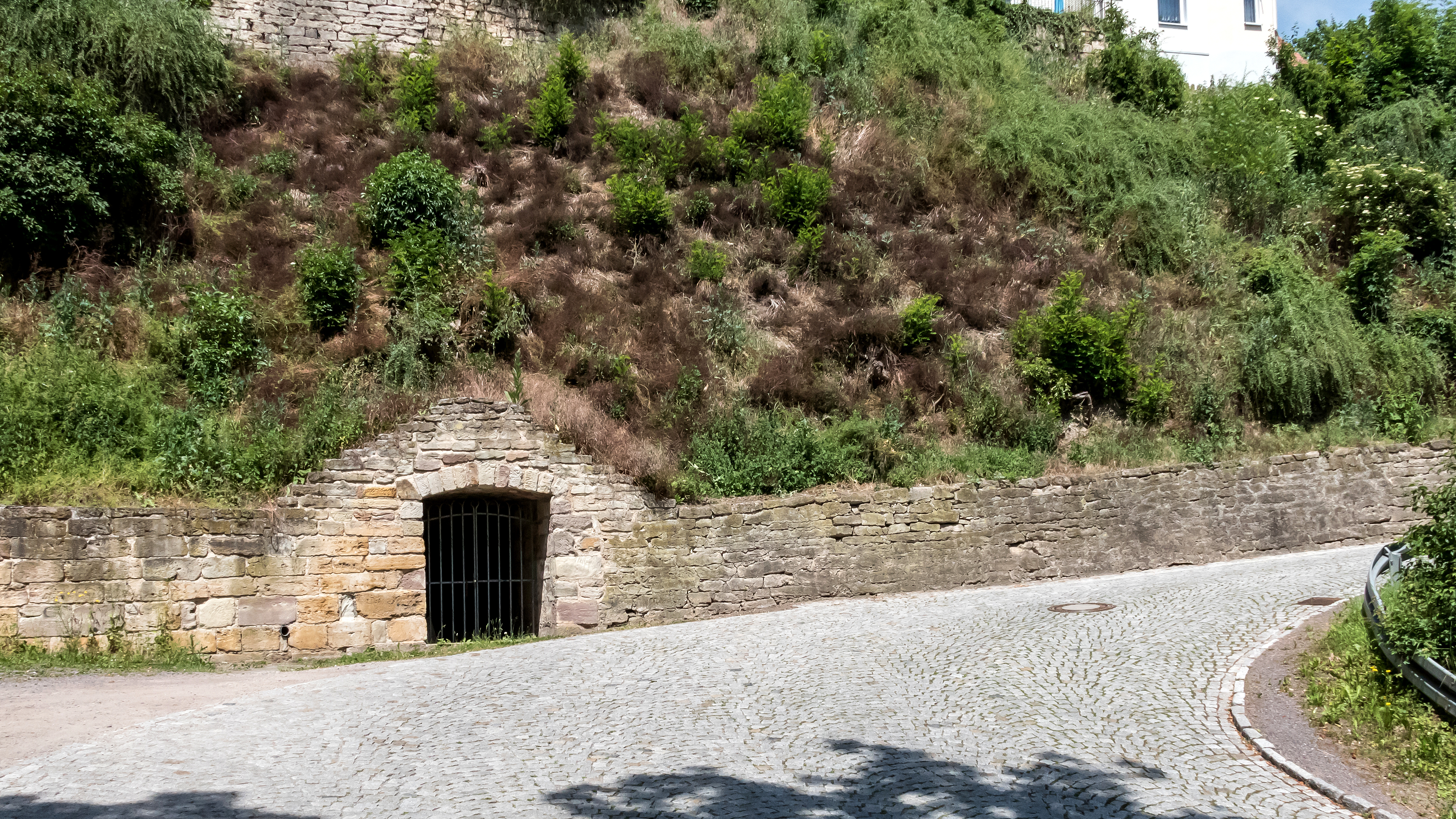 FFH-Gebiet Fledermausquartiere Orlamünde WDPA ID 555520608 ehem. Luftschutzkeller Stadtberg I